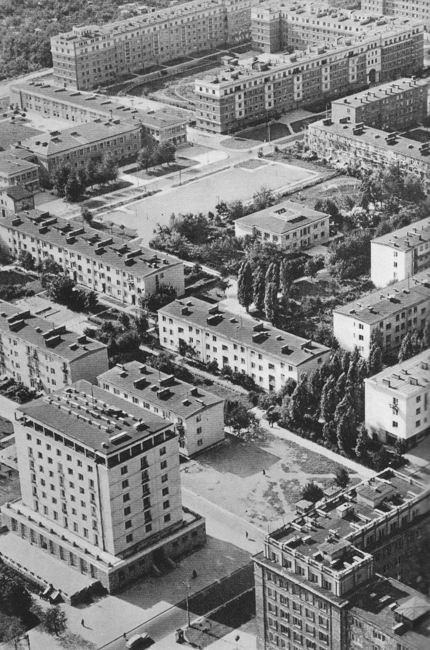 Osiedle Warszawskiej Spółdzielni Mieszkaniowej na Mokotowie